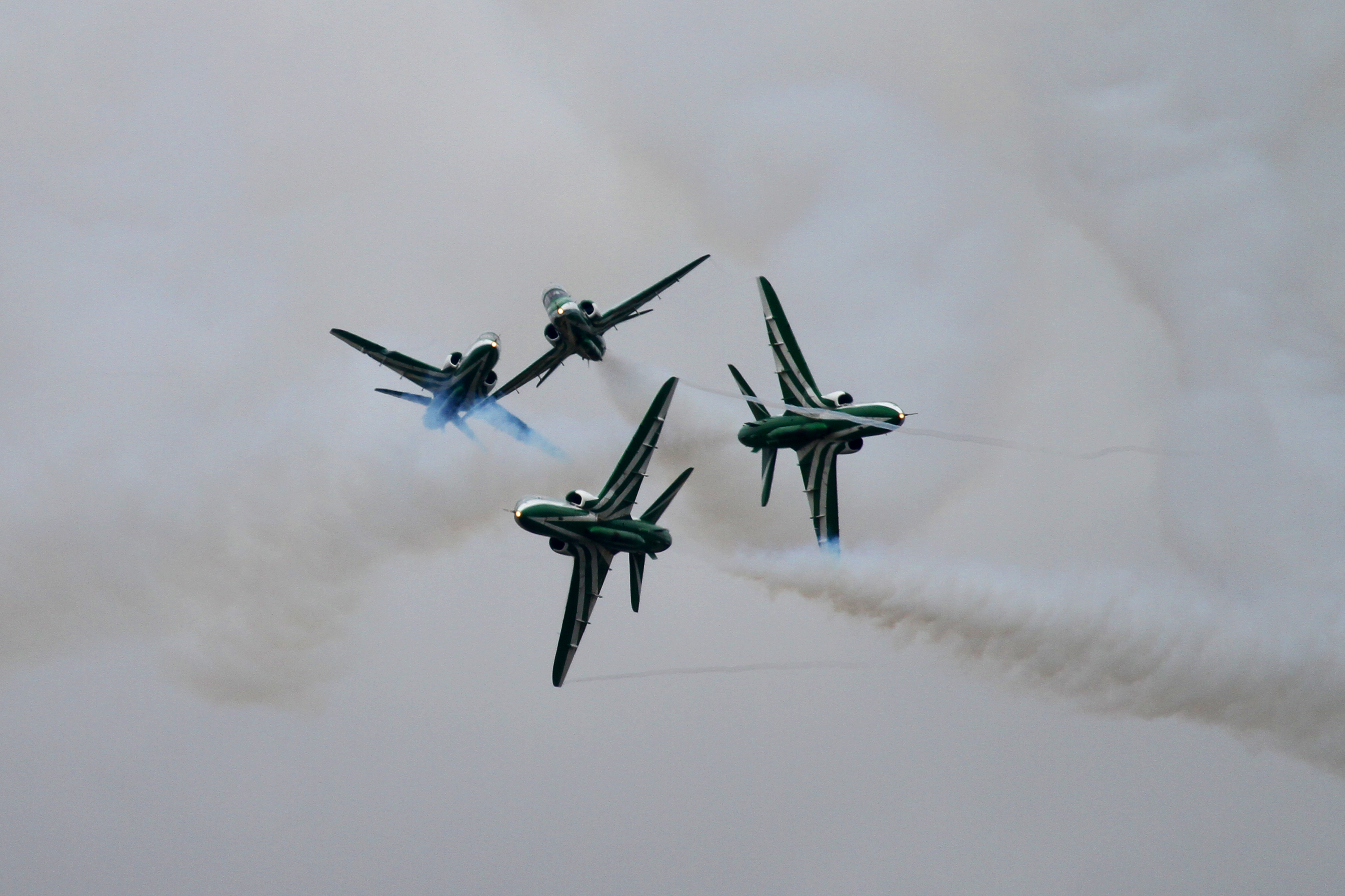 Saudi Hawks 2